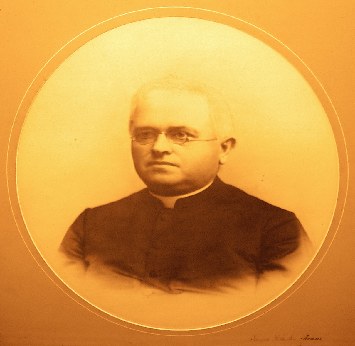 Rektor Bruns in Grunewald später Burscheid